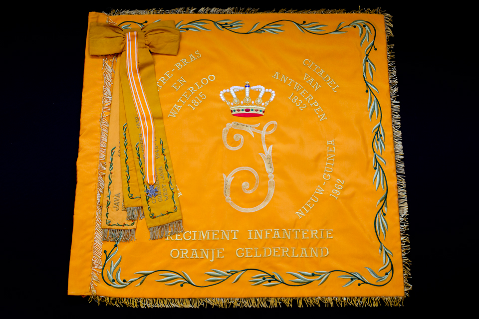 Het vaandel van het Regiment Infanterie Oranje Gelderland, inclusief cravattes en het Herdenkingskruis 1813-1815